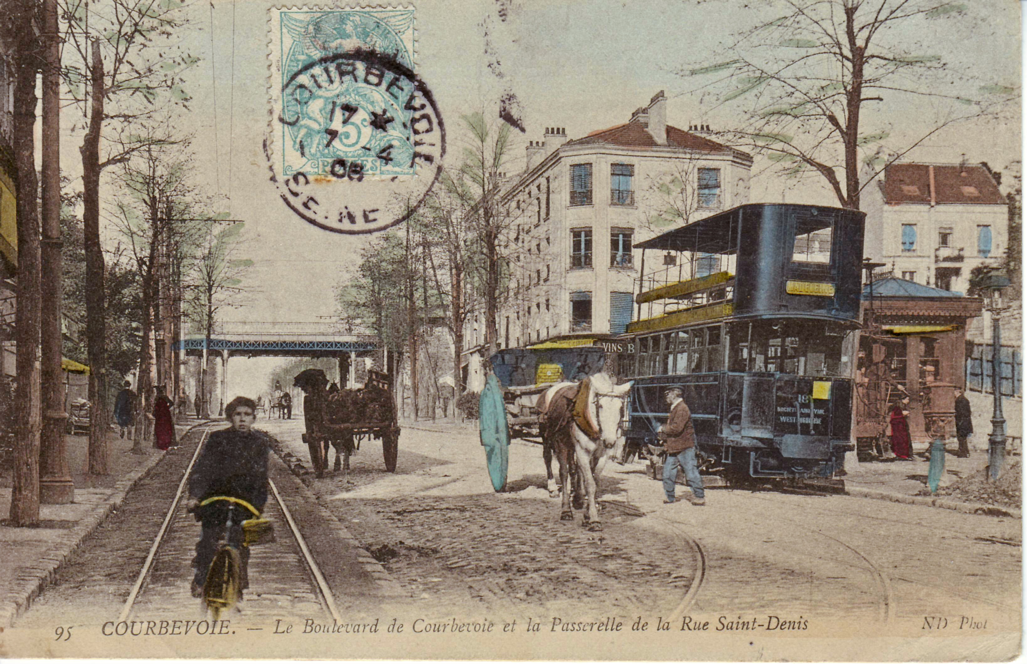 Carte postale ancienne éditée par ND, n°95 : COURBEVOIE - Le Boulevard de Courbevoie et la Passerelle de la Rue Saint-Denis. Tramway de la ligne 1 des TPDS pour La Madeleine (motrice électrique à accumulateurs, système Heilmann